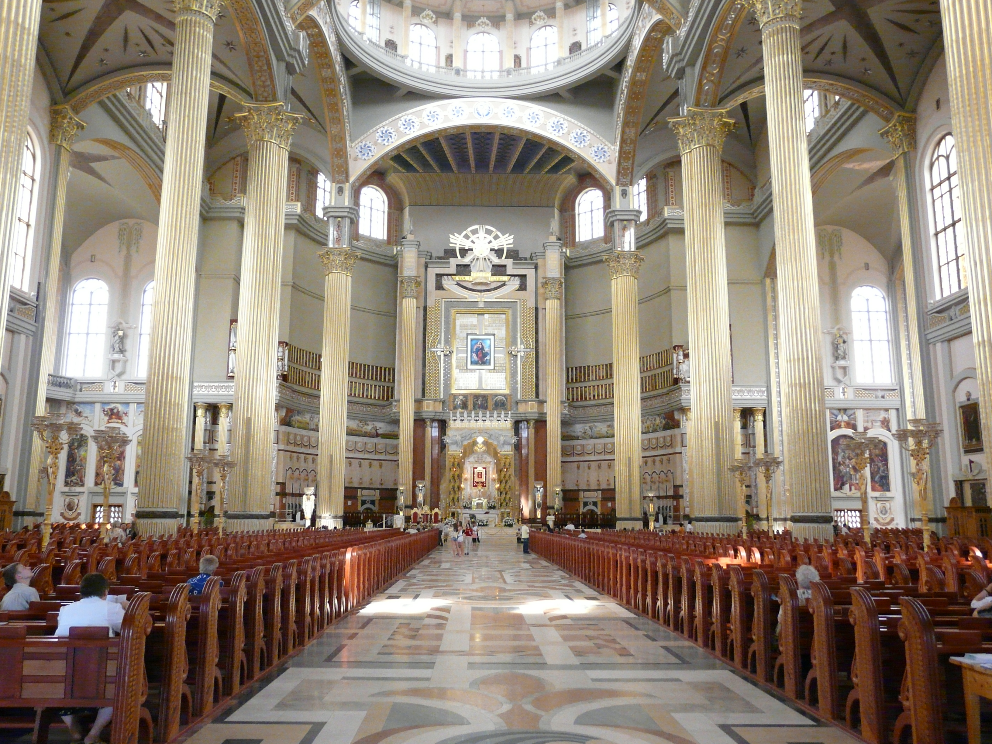 Licheń